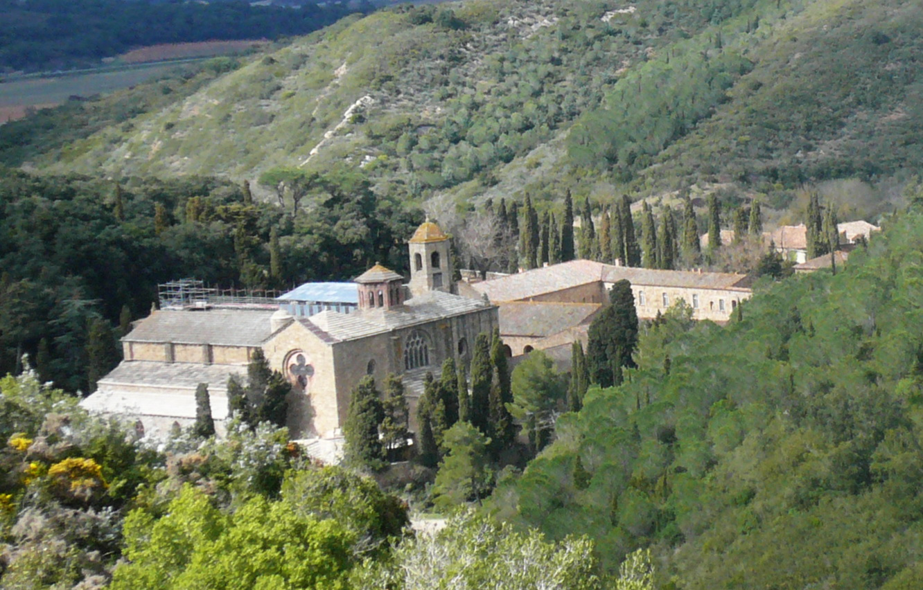 Abbaye de Fontfroide (Narbonne)